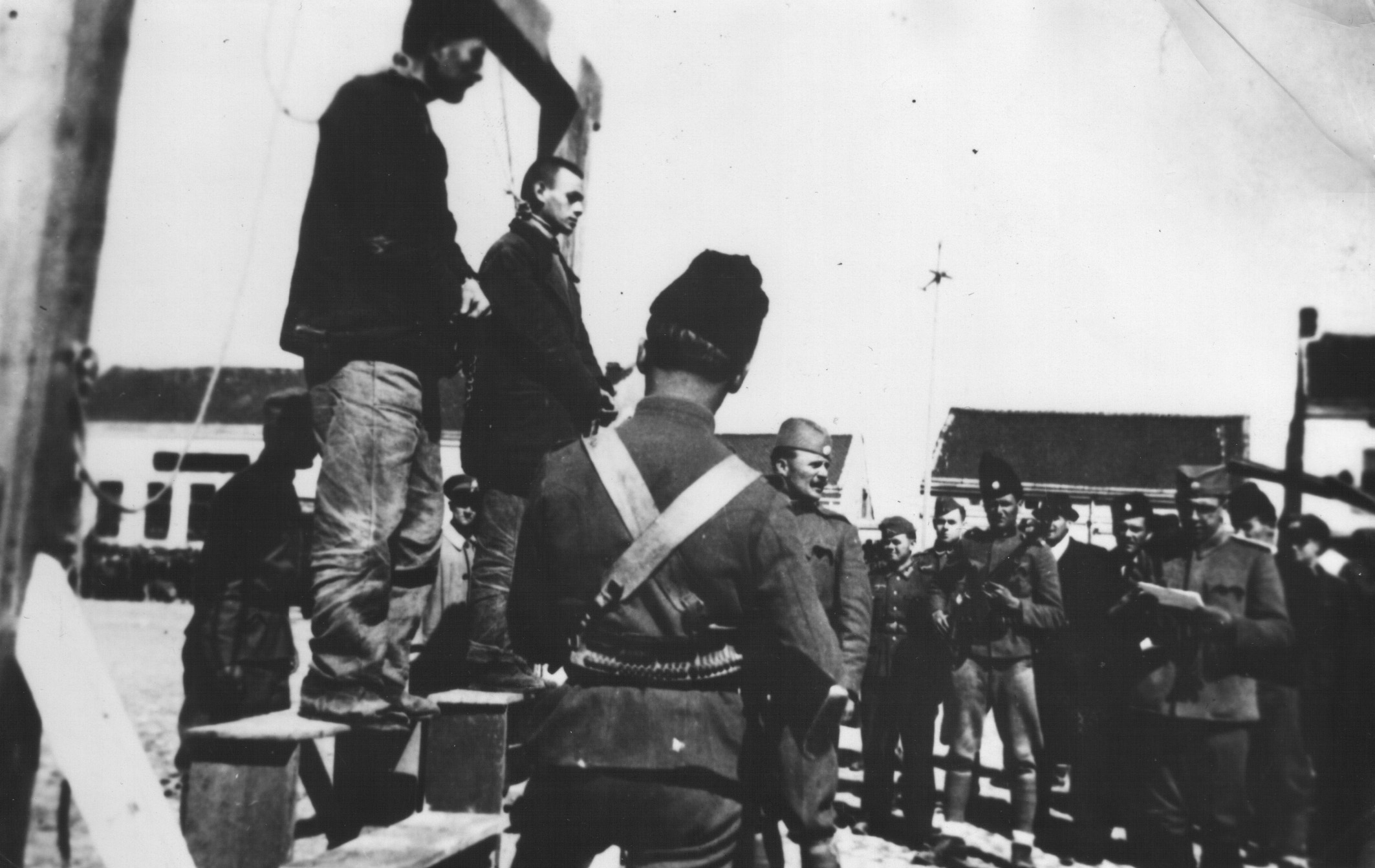 Srpskohrvatski / српскохрватски: Stevan Borota, komandir čete Posavsko-tamnavskog partizanskog odreda, i Josip Majer, politički komesar, obešeni u Valjevu 1942. godine.